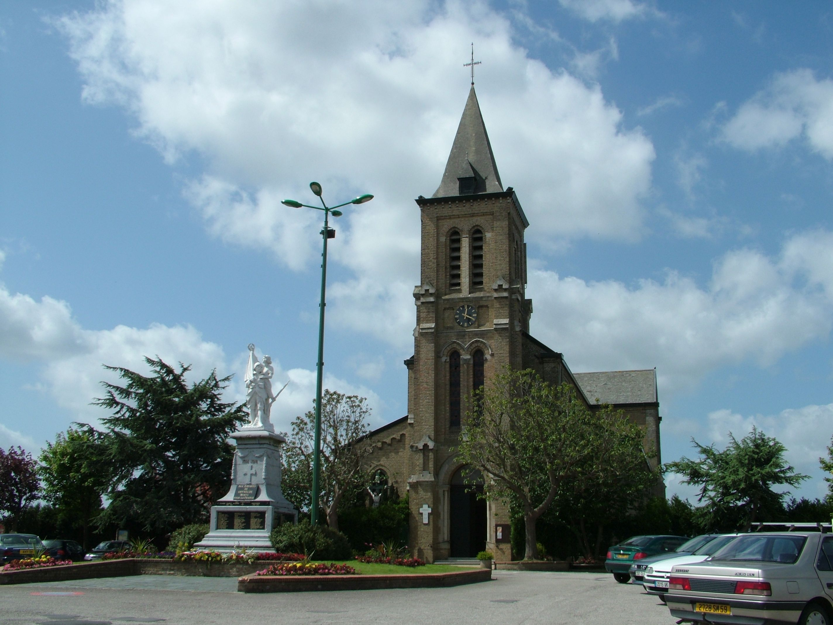 Das Bild zeigt die Kirche und das Kriegerdenkmal von Ghyfelde.